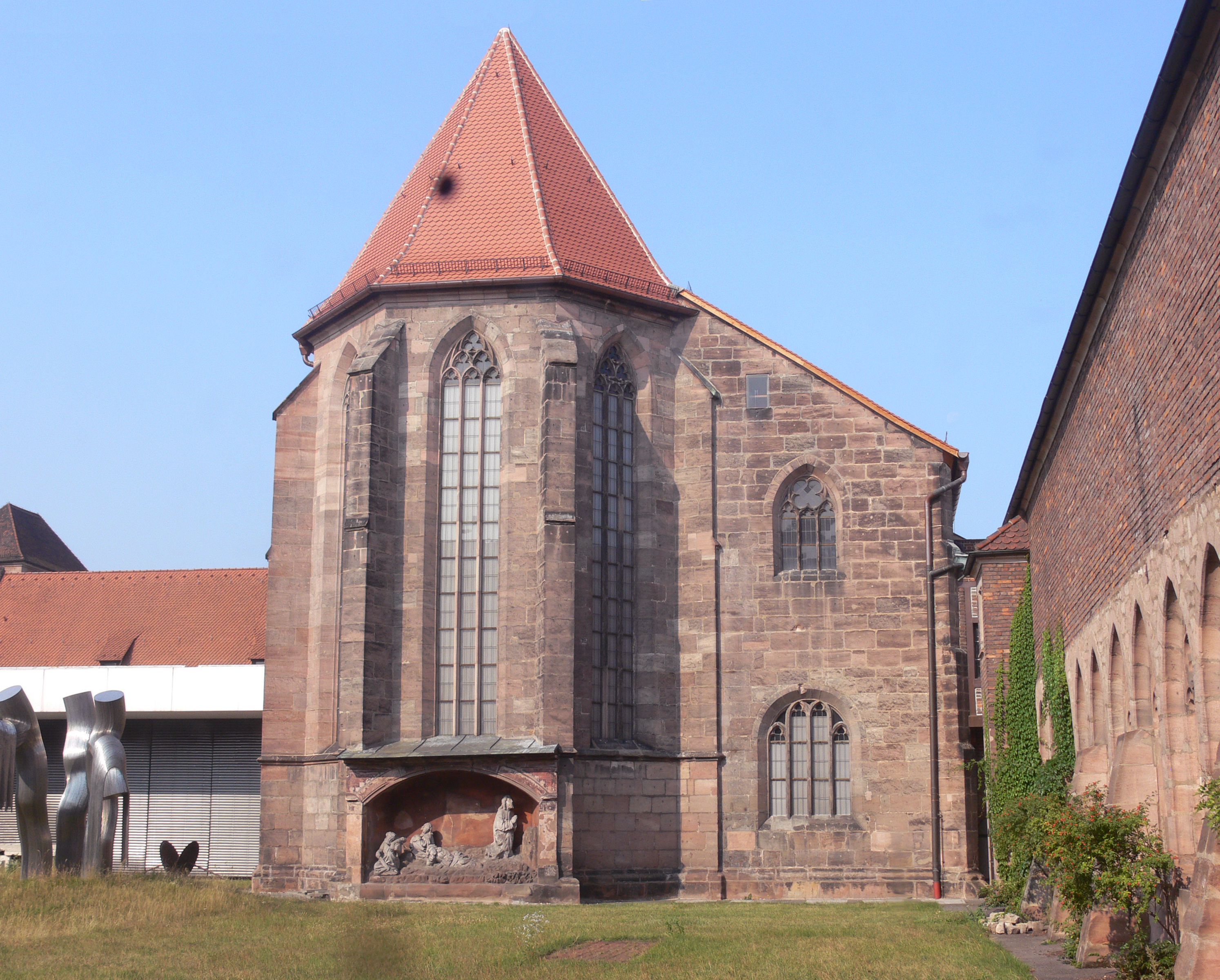 Nuremberg - Germanisches Nationalmuseum